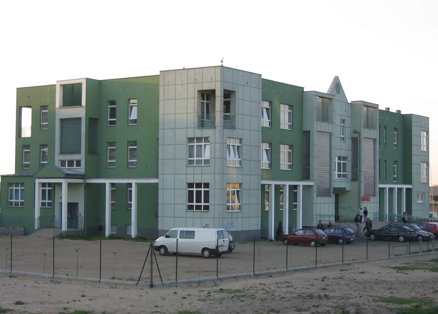 Zespół Szkół Muzycznych im. Apolinarego Szeluty. (foto. Marcin Majdecki)